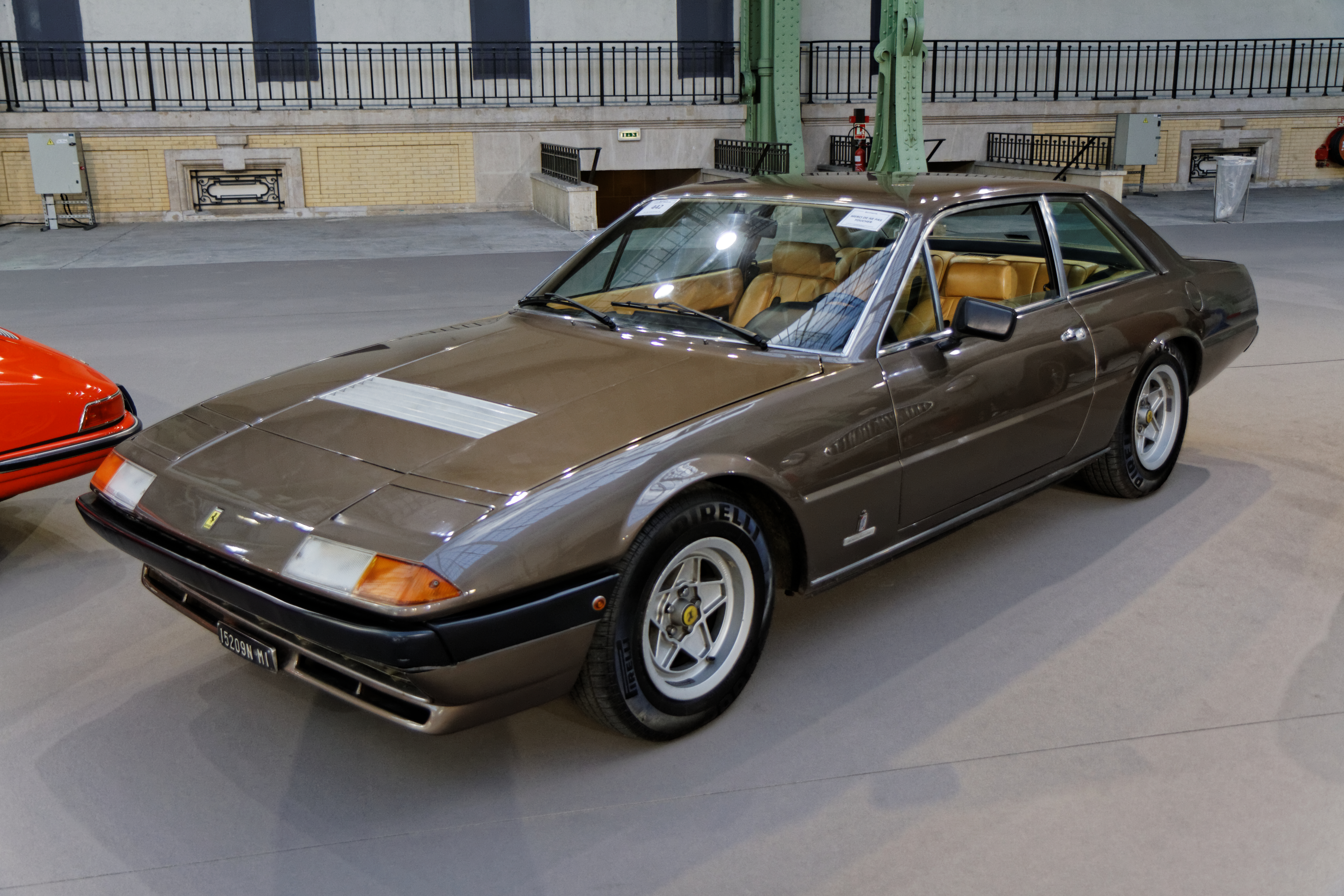 Une Ferrari 400GT Automatic Sports Saloon au Grand Palais lors de la vente Bonhams en février 2014.